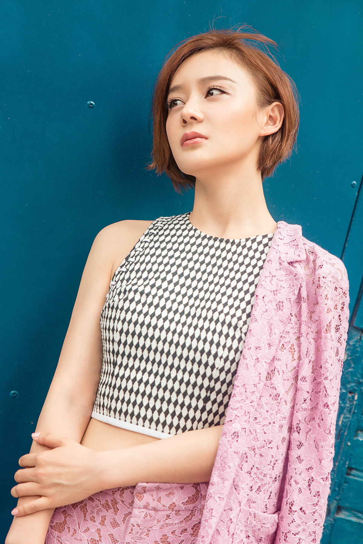 Yuan Shan Shan in 2018